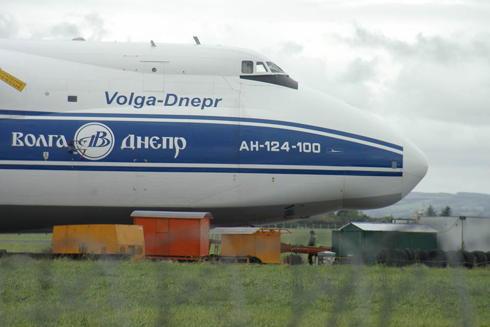 Antonov AN-124-100, Volga-Dnepr Airlines, Shannon Airport. Danny Burke